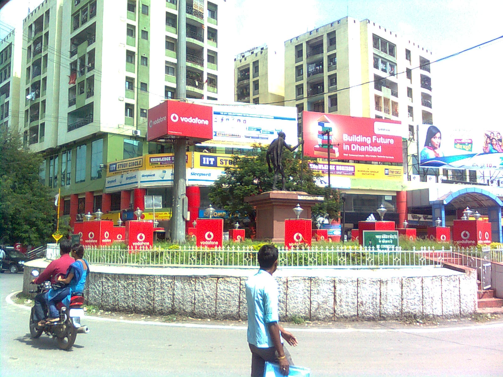 धनबाद